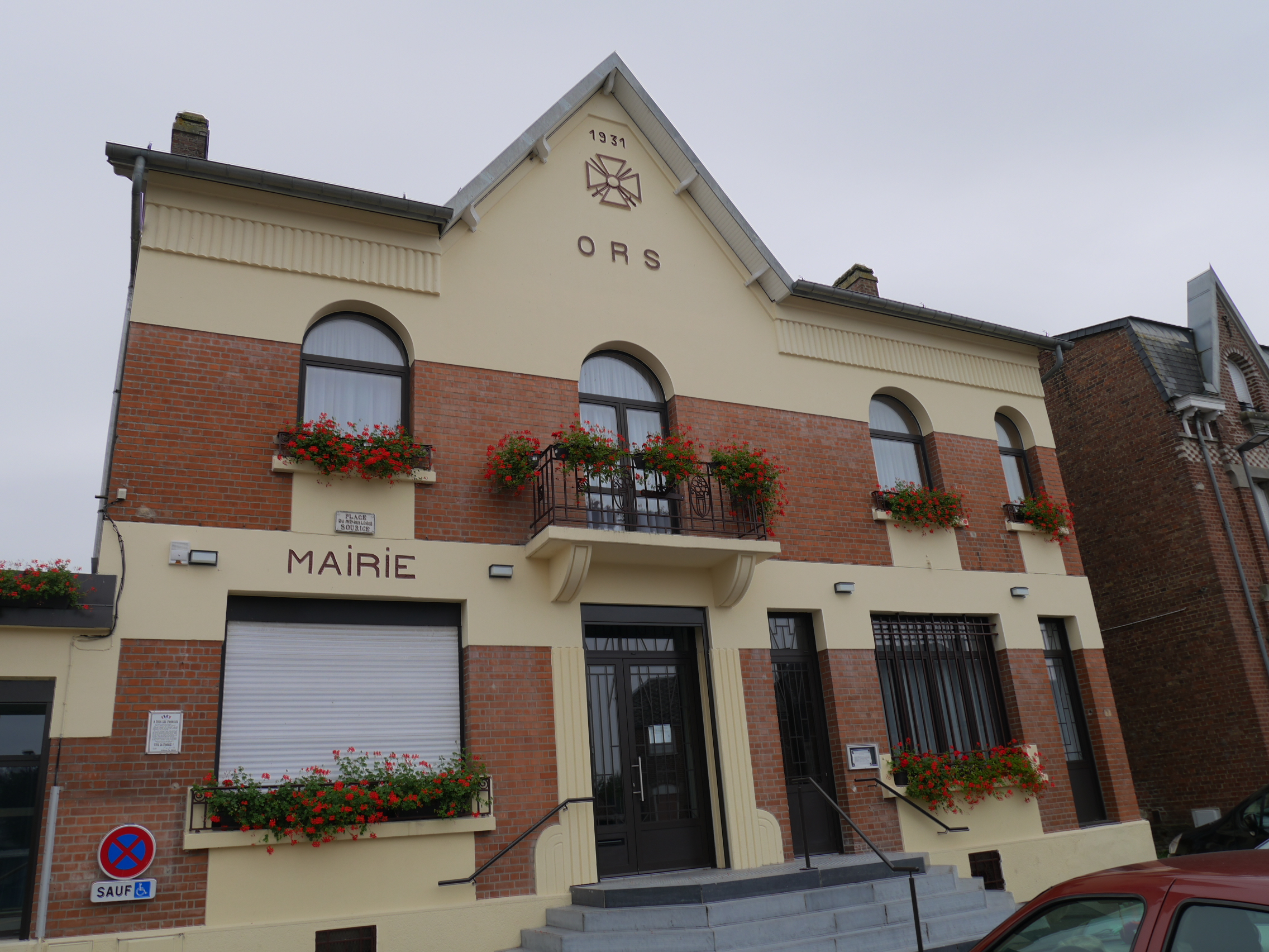 Mairie d'Ors (Nord, France)